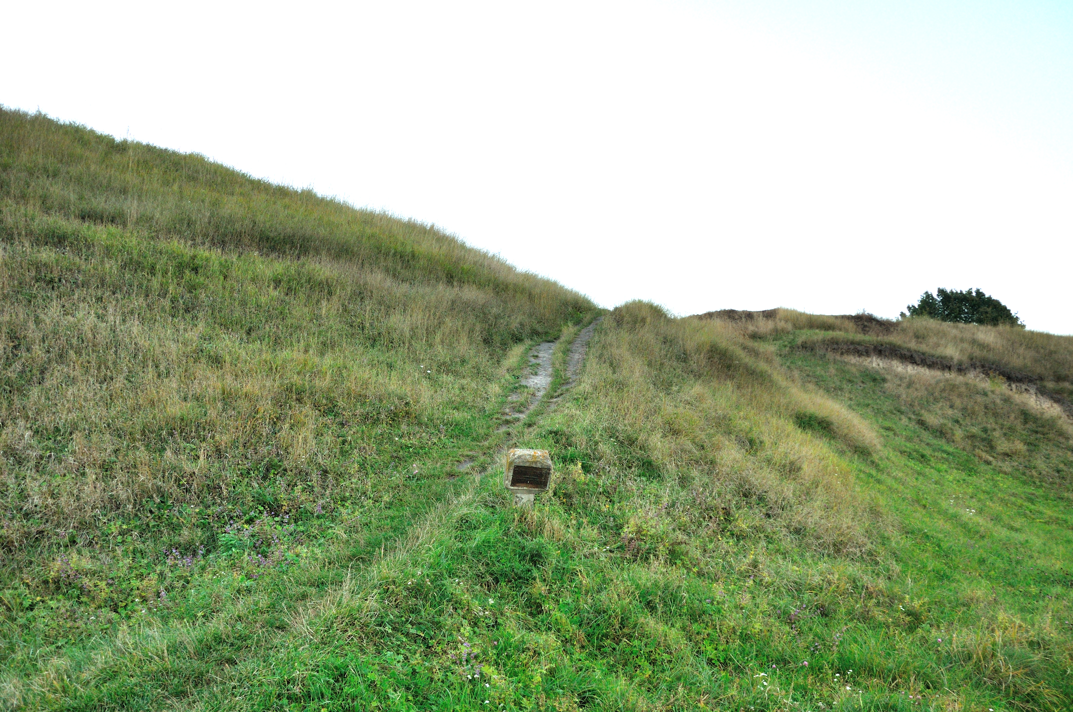 Городище, Рівне, вул. Басівкутська, 121